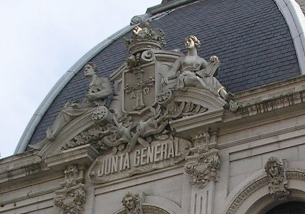 Escudo alegórico de la fachada de la Junta General del Principado de Asturias de Víctor Hevia Granda.